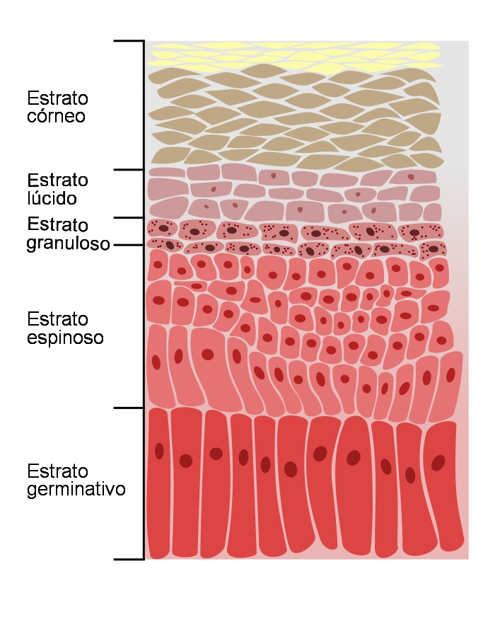 Esquema en el que se representan graficamente las distintas capas que forman la epidermis.